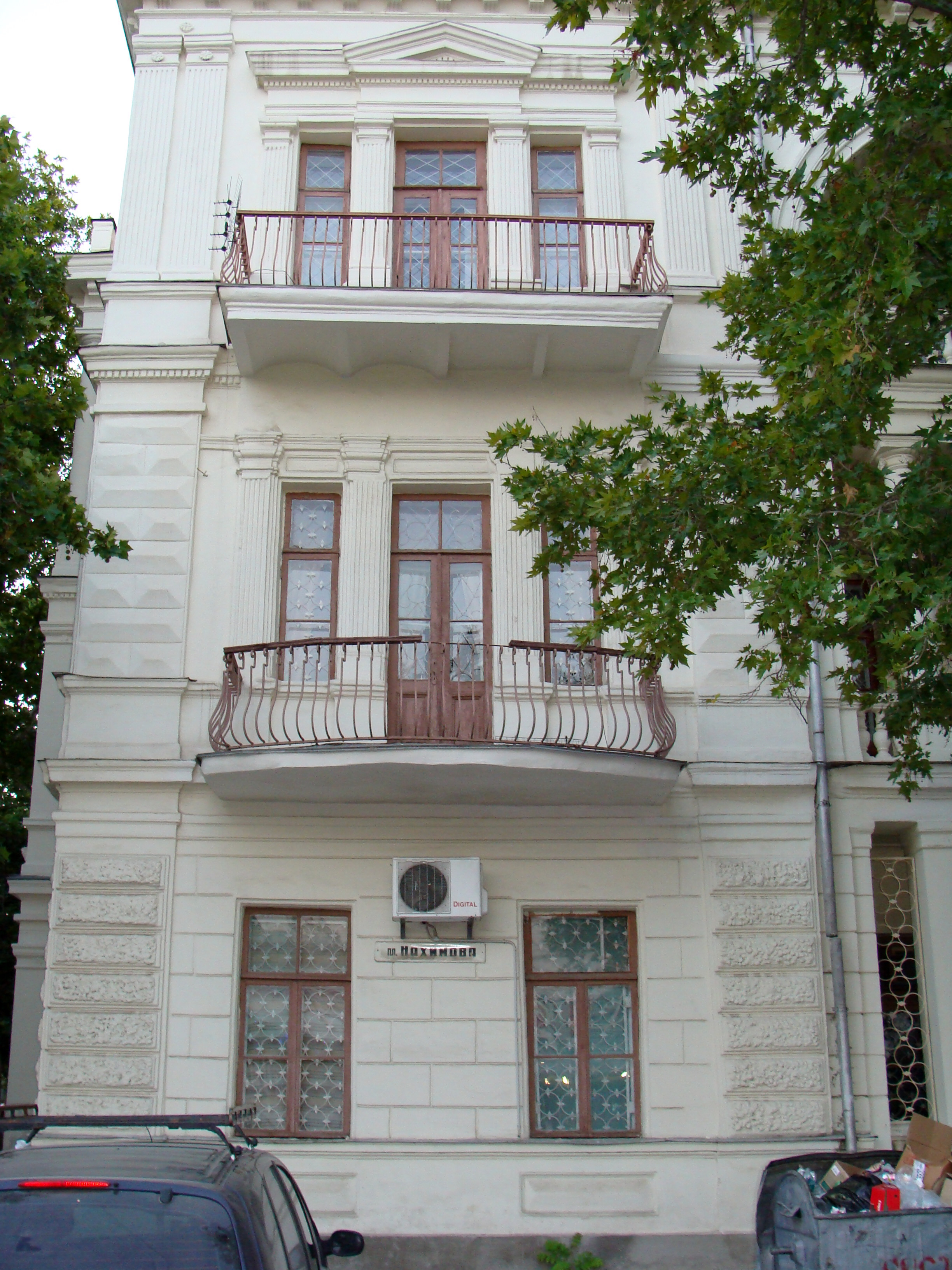 Здание бывшей гостиницы "Кистъ"